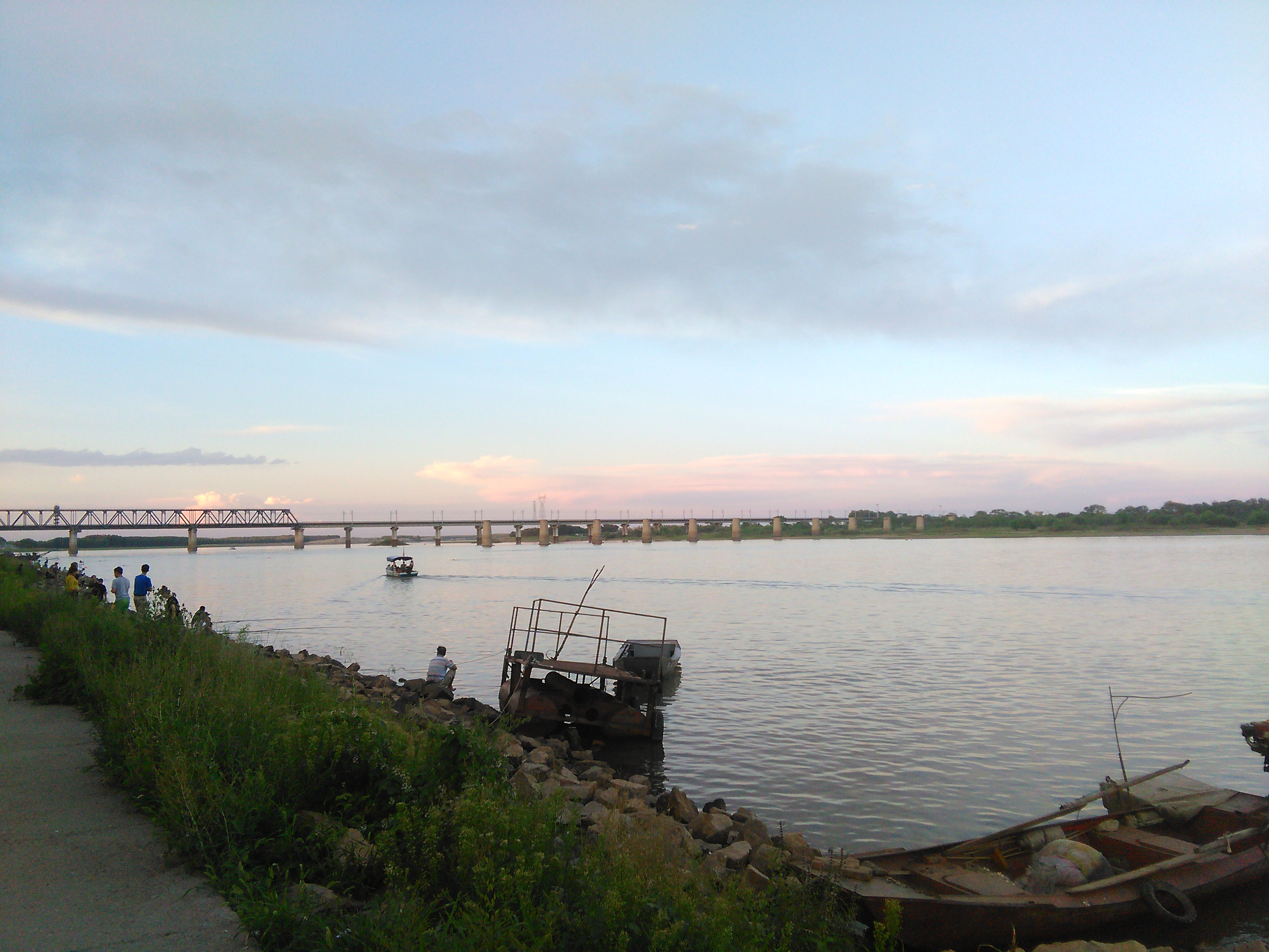 红岸公园眺望嫩江